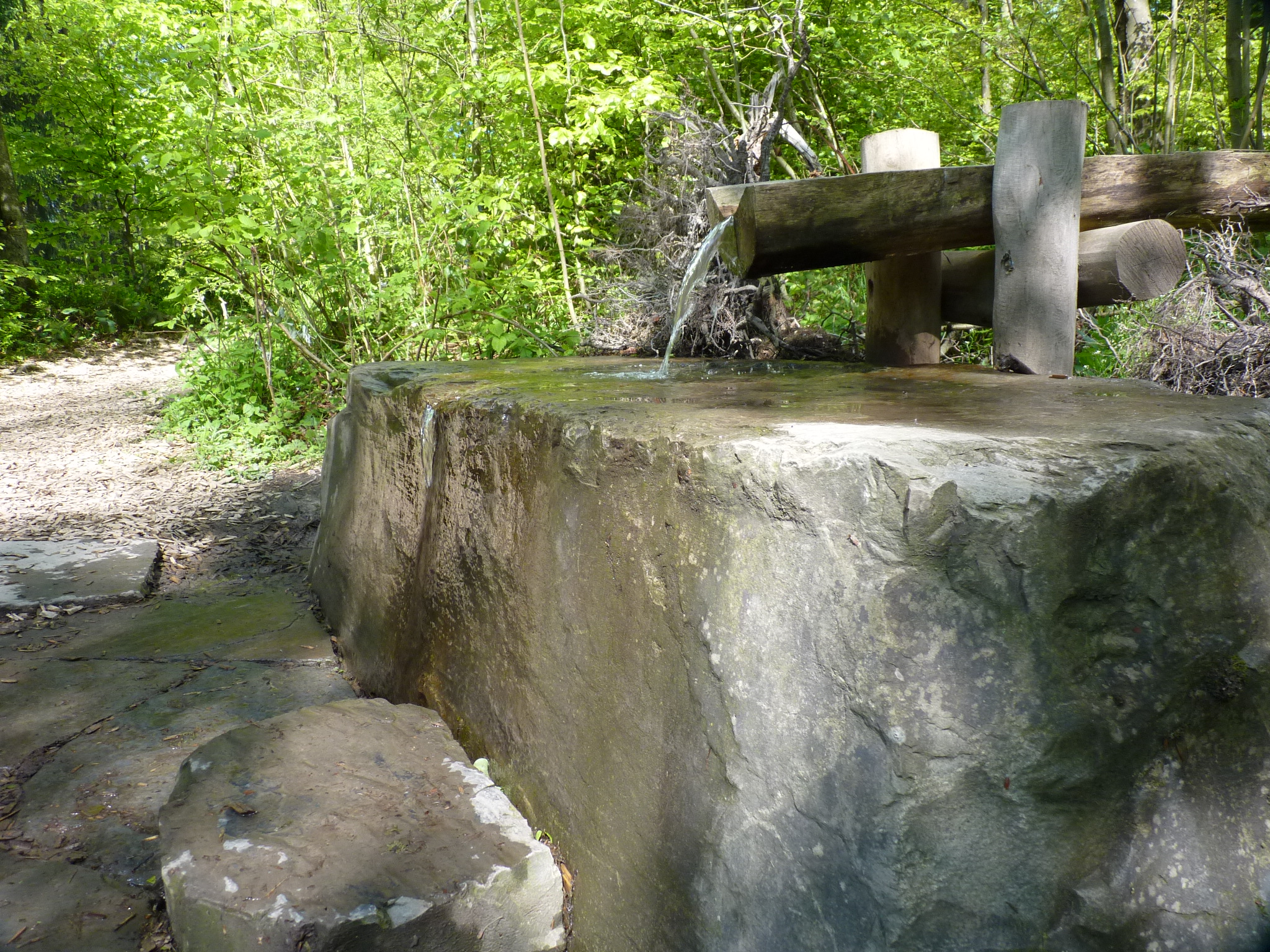 Die Wasserentnahmestelle der Siegquelle im Mai 2014